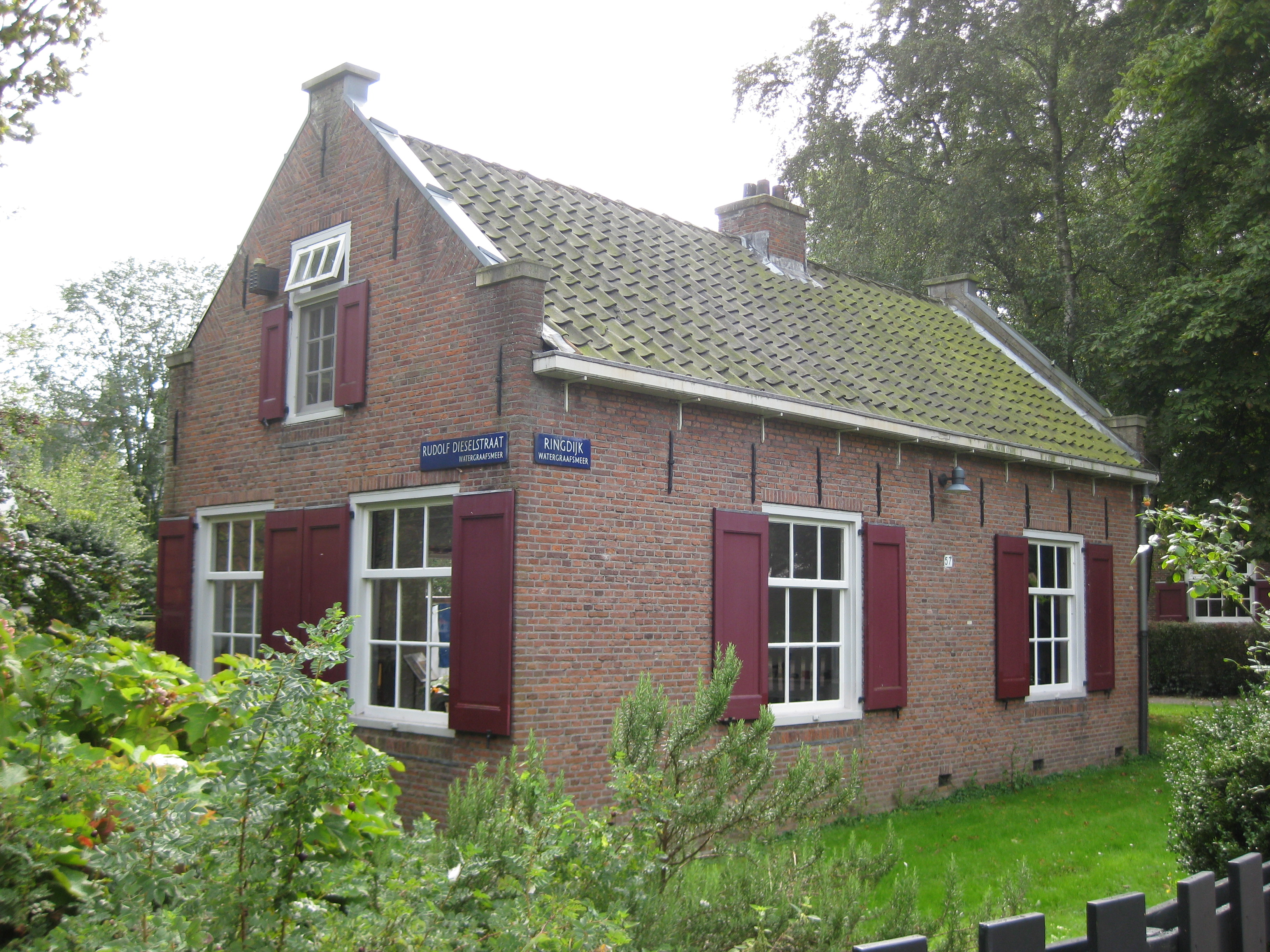 Eenvoudig huisje behorende tot het complex van de Vergulde Eenhoorn aan de Ringdijk 57 in Amsterdam-Zuid